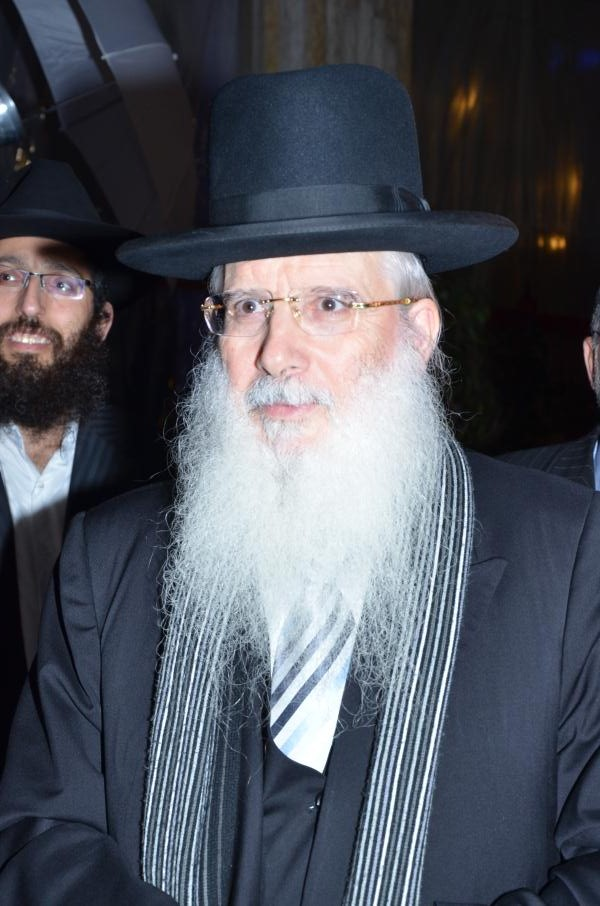 מעודכן לשנת 2013